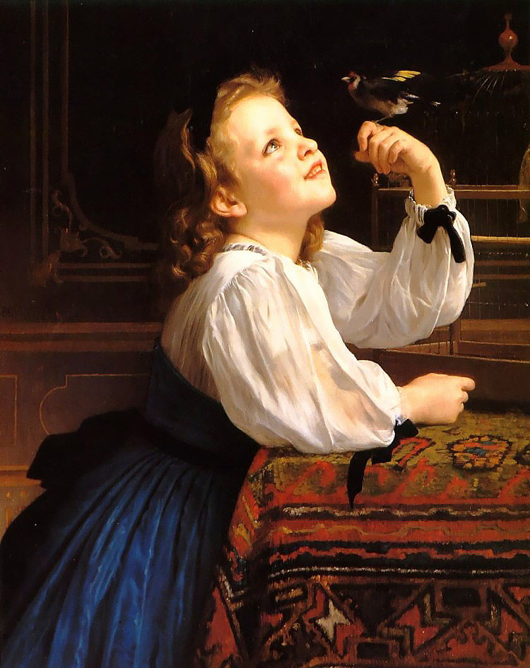 "Tête d'Etude l'Oiseau". Carduelis carduelis, chardonneret élégant.